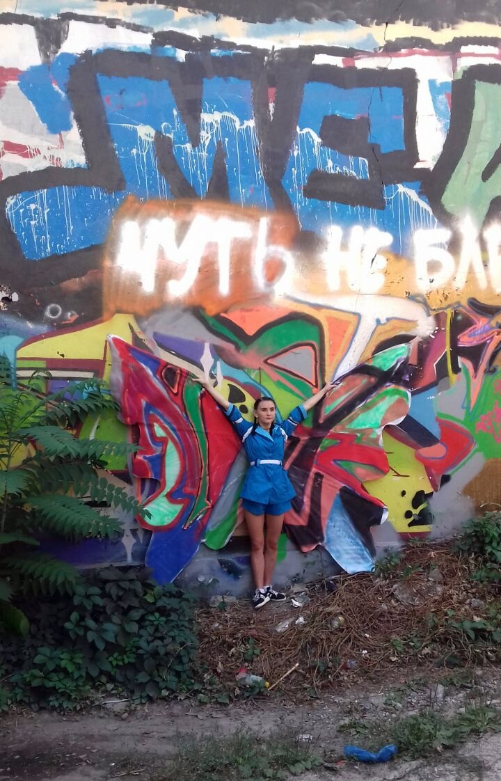 Сцена из спектакля «Волшебная страна». Ростов-на-Дону, театр «18+»